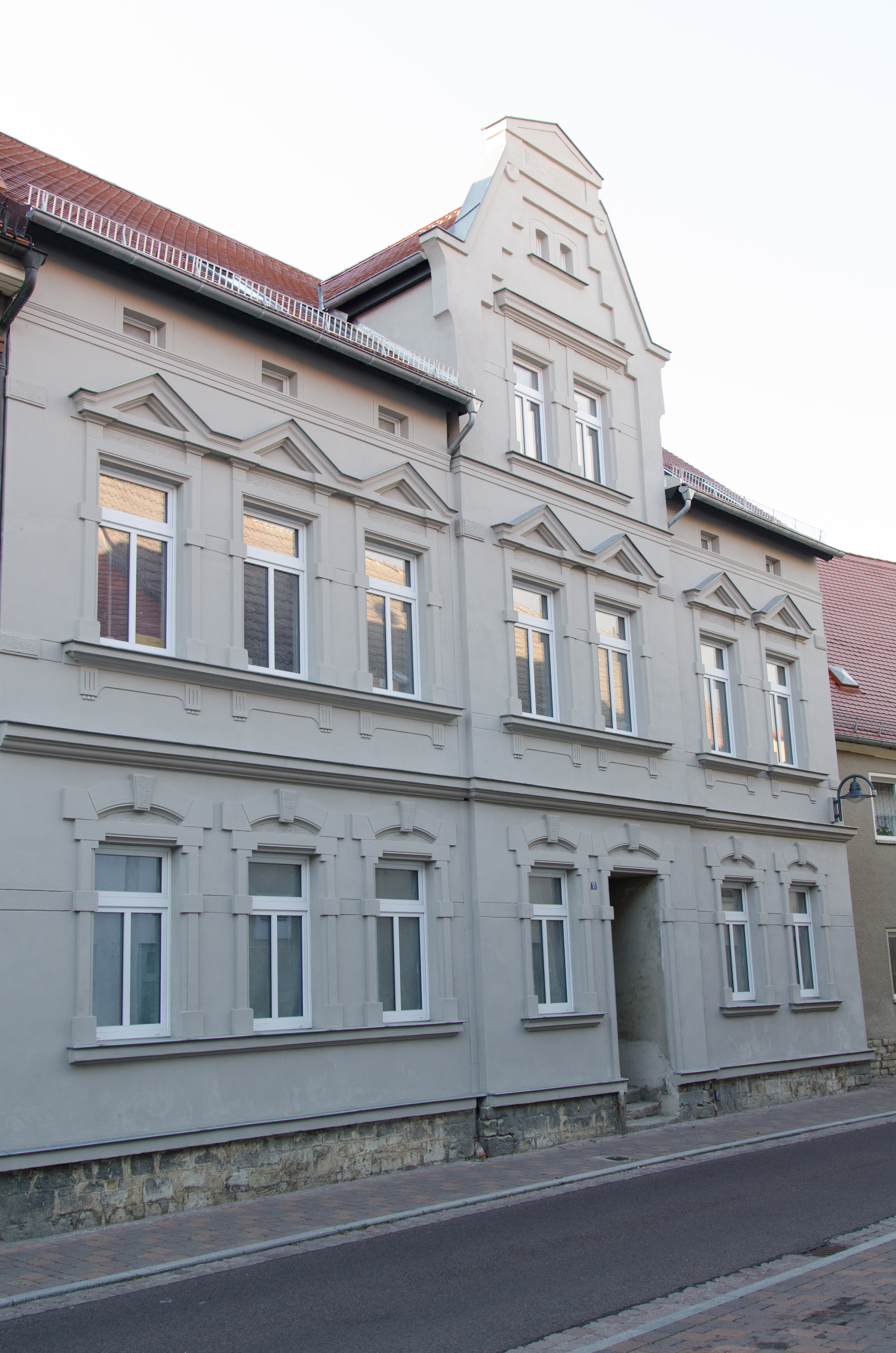 Querfurt, Klosterstraße 11